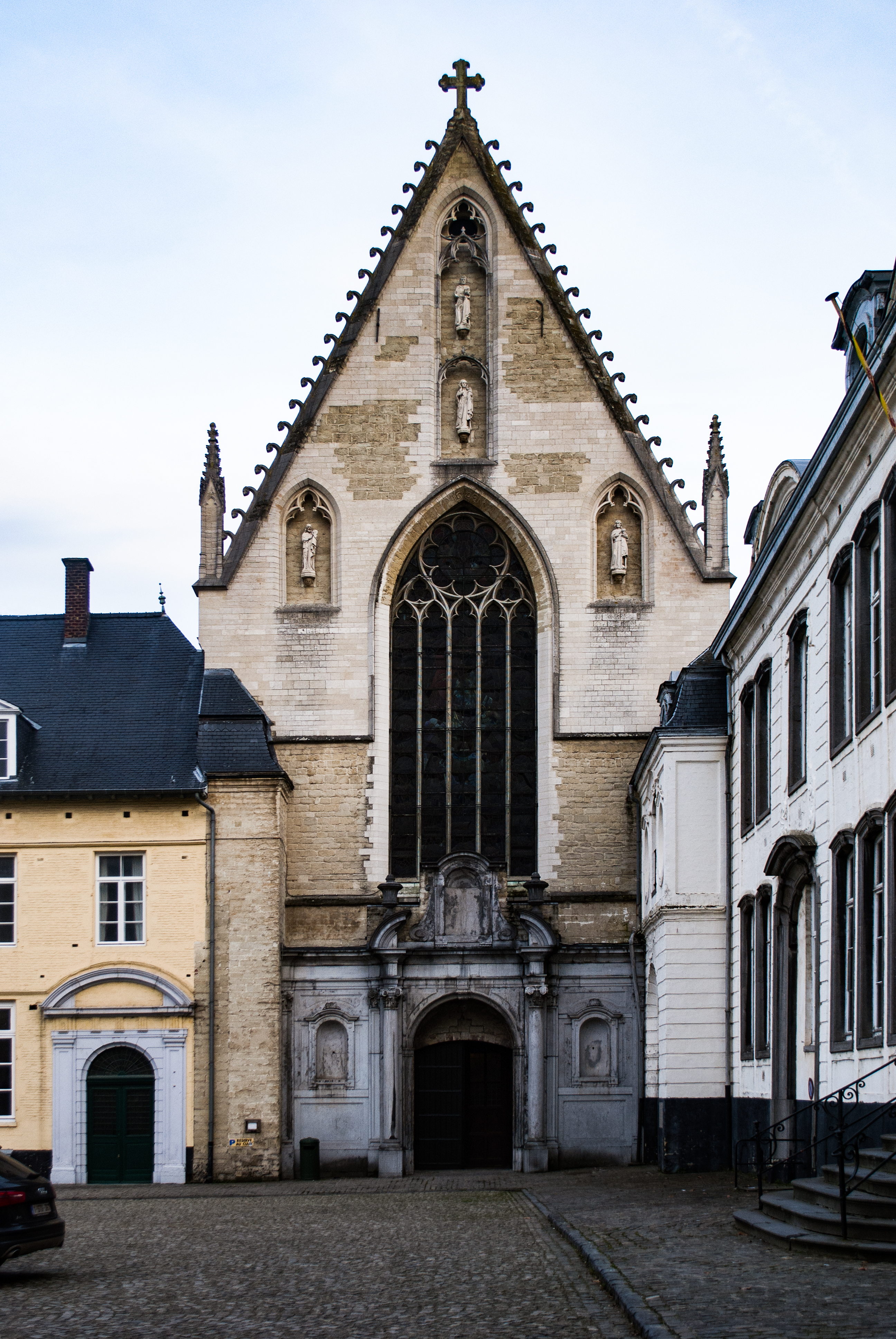 Porte principale de l'Eglise de l'abbaye de la Cambre